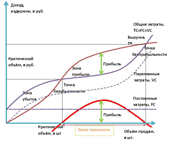 CVP-анализ (нелинейная функция). Точка безубыточности